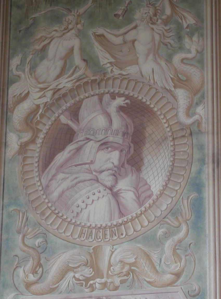 Hagen-Bild aus dem Nibelungenzyklus am Mamorpalais in Potsdam. Bild von mir, September 2006